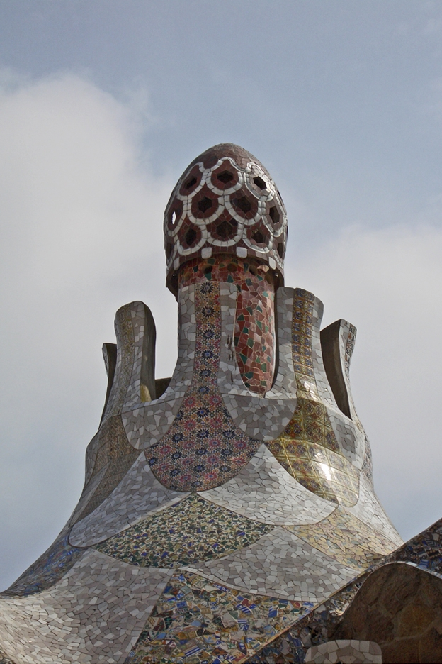 Parc Güell (Barcelona), Arquitecte: Antoni Gaudí i Cornet. Patrimoni de la Humanitat per la UNESCO al 1984.